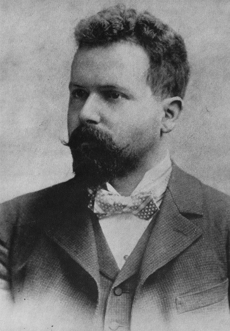 Mladý Viktor Dyk